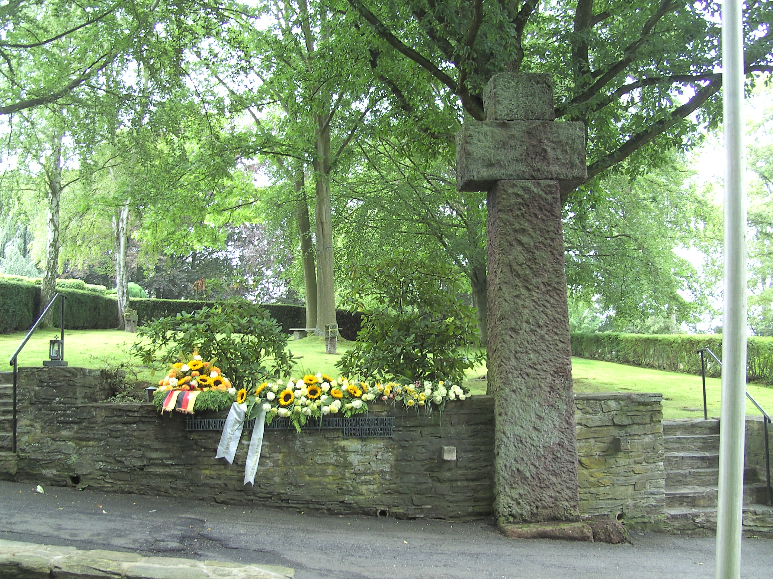 Kriegsgräberstätte Idstein - Idstein war cemetery